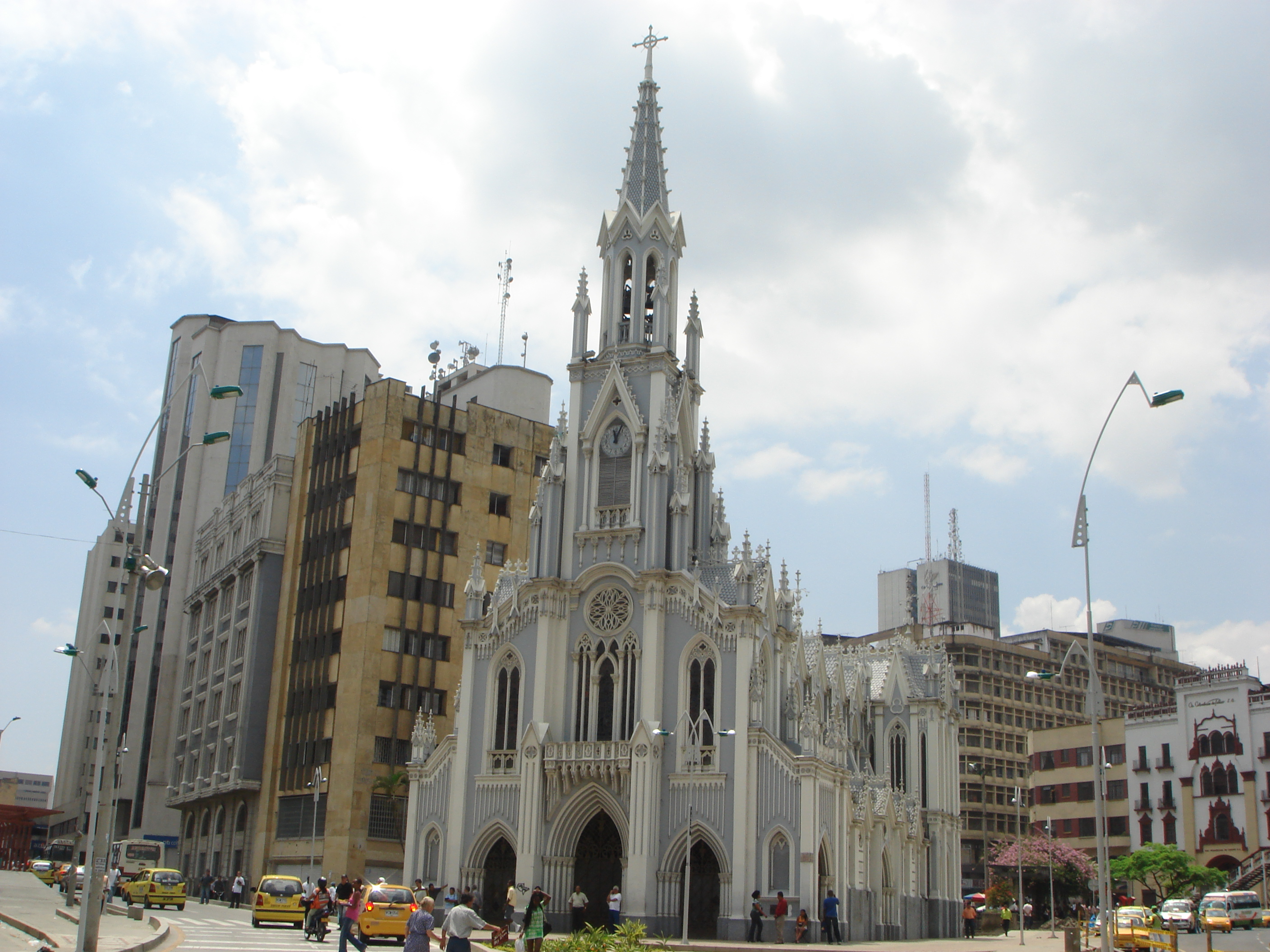 Iglesia la Ermita, Cali, Colombia